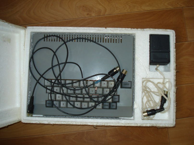 Электроника КР05